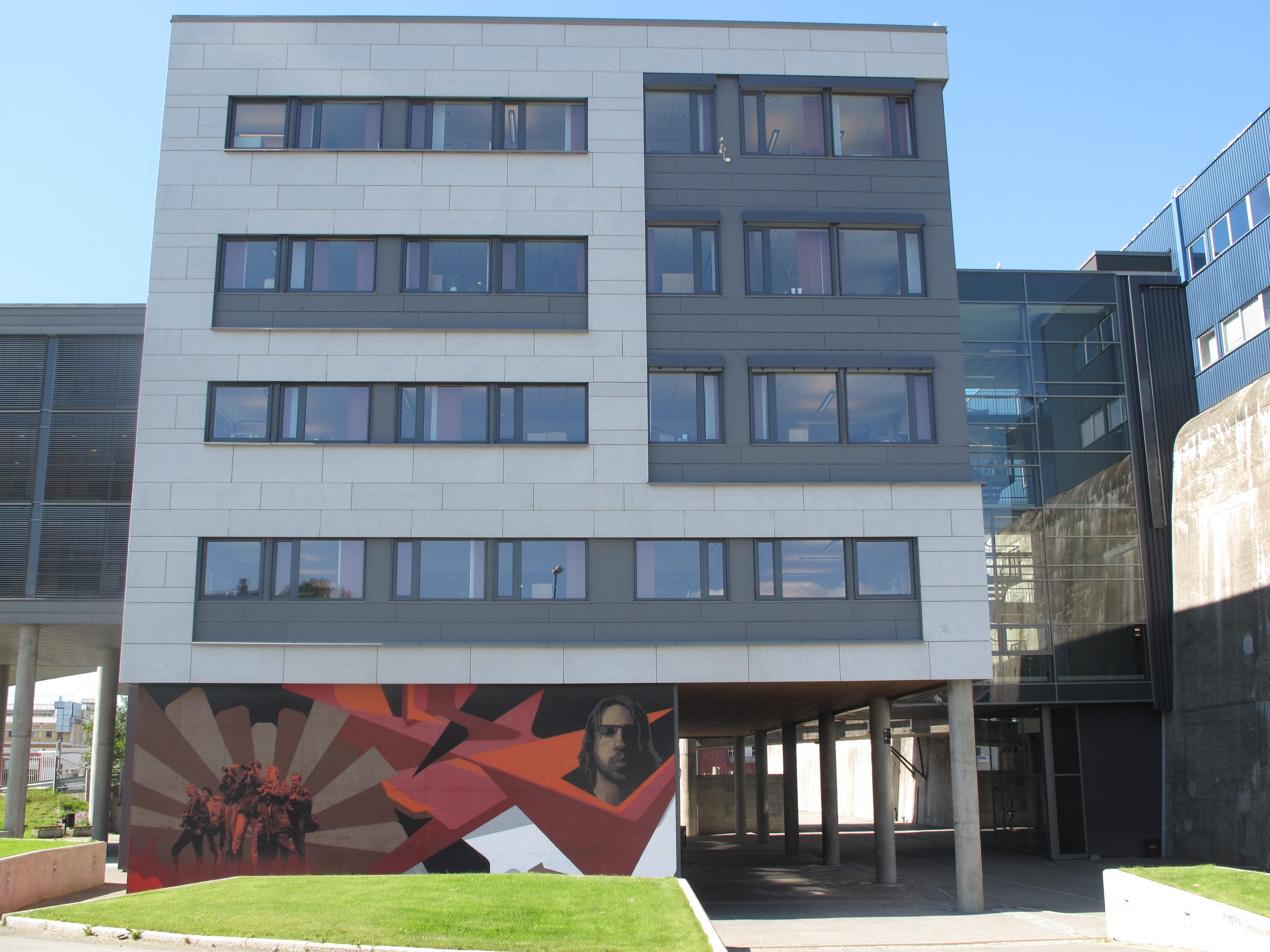 Arkivsenteret i Trondheim